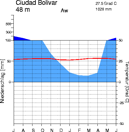 A climate diagram of Ciudad Bolivar, Venezuela